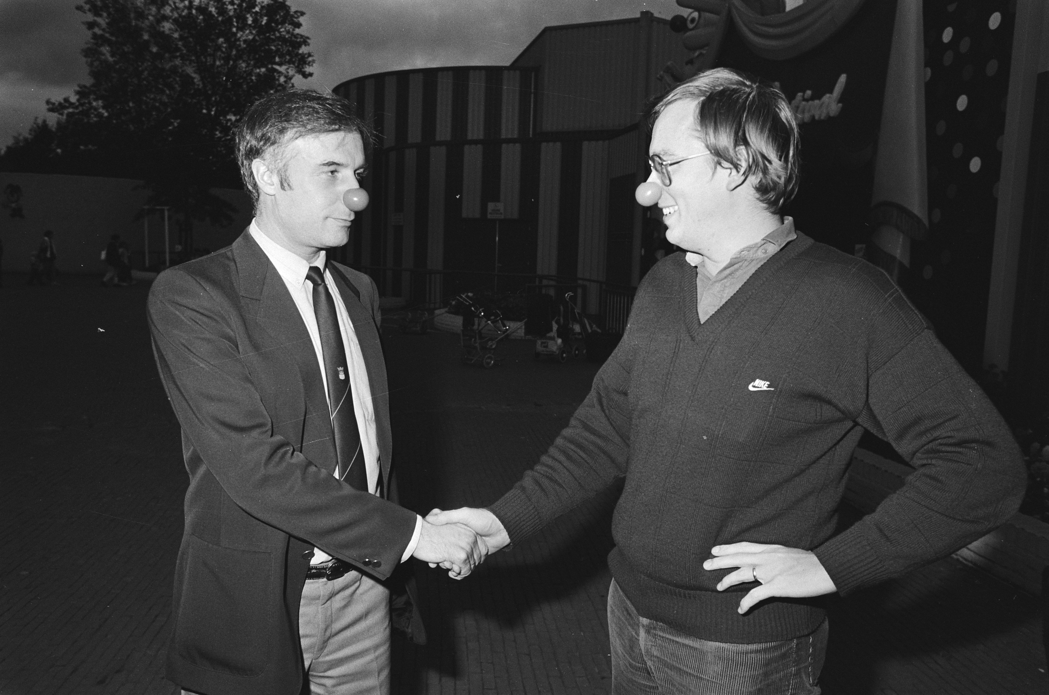 Clerc (r) feliciteert Gantwarg met de overwinning van de match.